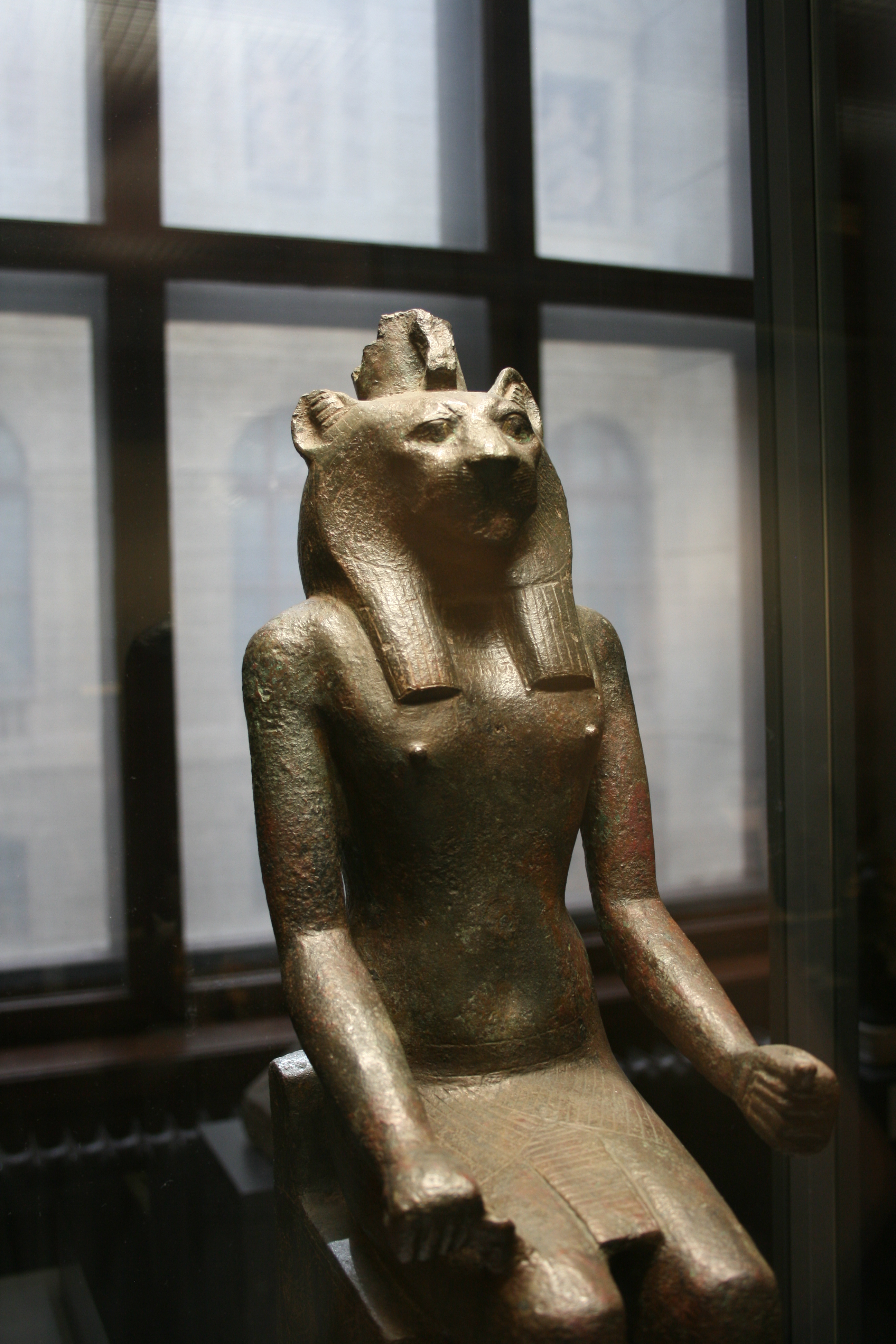 Mahes